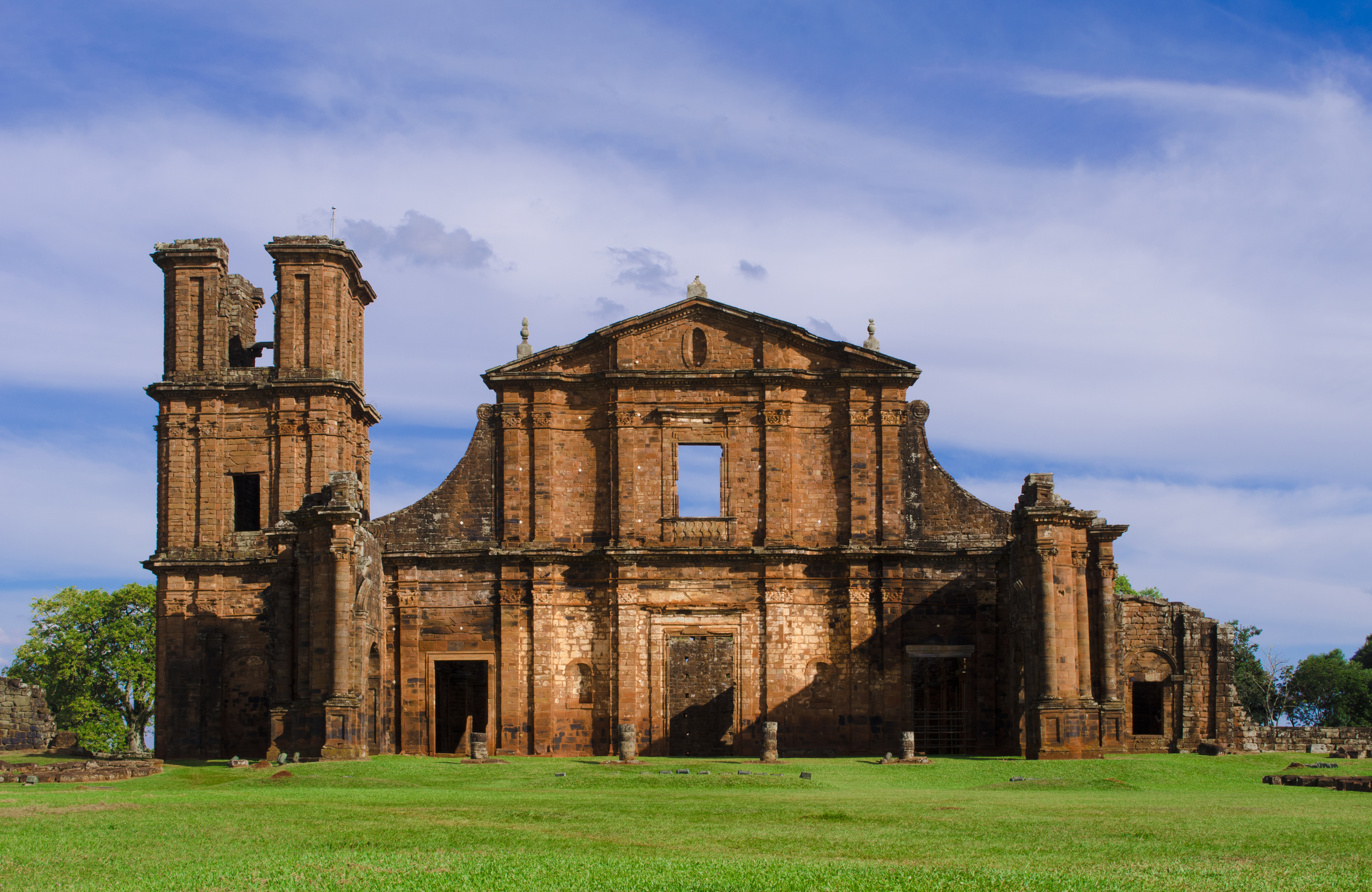 Povo de São Miguel: remanescentes e ruínas da Igreja de São Miguel